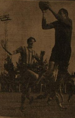 Unión - Rosario Central, disputado el 3 de abril de 1936. El arquero Lezcano (Unión) toma la pelota ante el delantero Aníbal Maffei (Rosario Central).